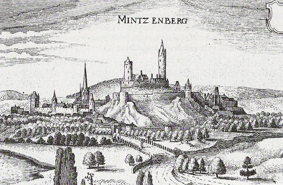 Burg Münzenberg in Münzenberg (Hessen) war Sitz der Herren von Hagen-Münzenberg; Kupferstich von Matthäus Merian